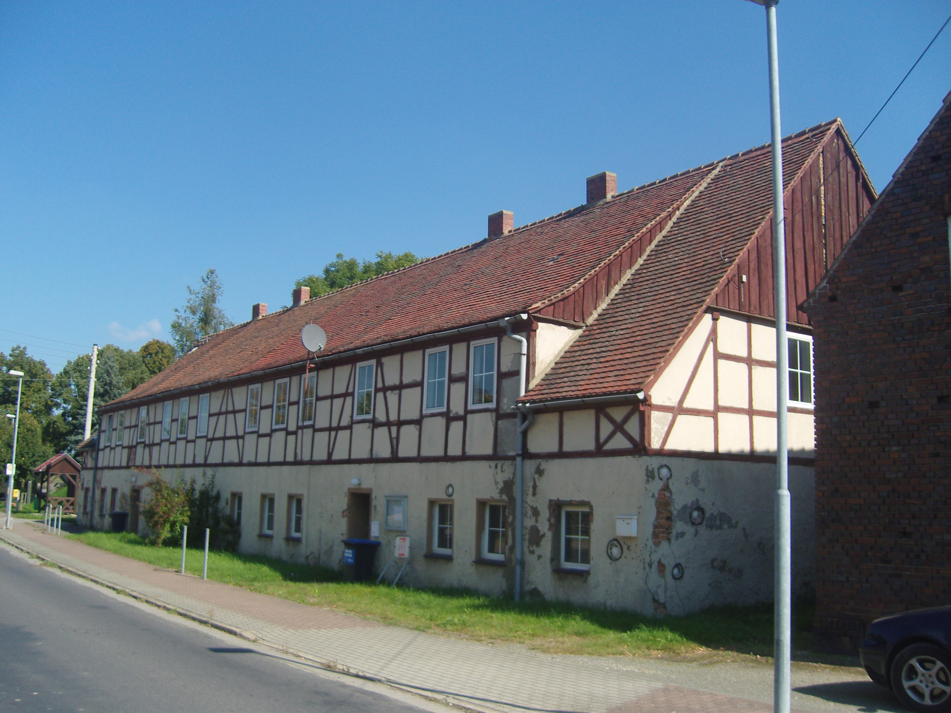 denkmalgeschütztes Gutsarbeiterhaus in Lipten